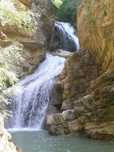 Marr nga